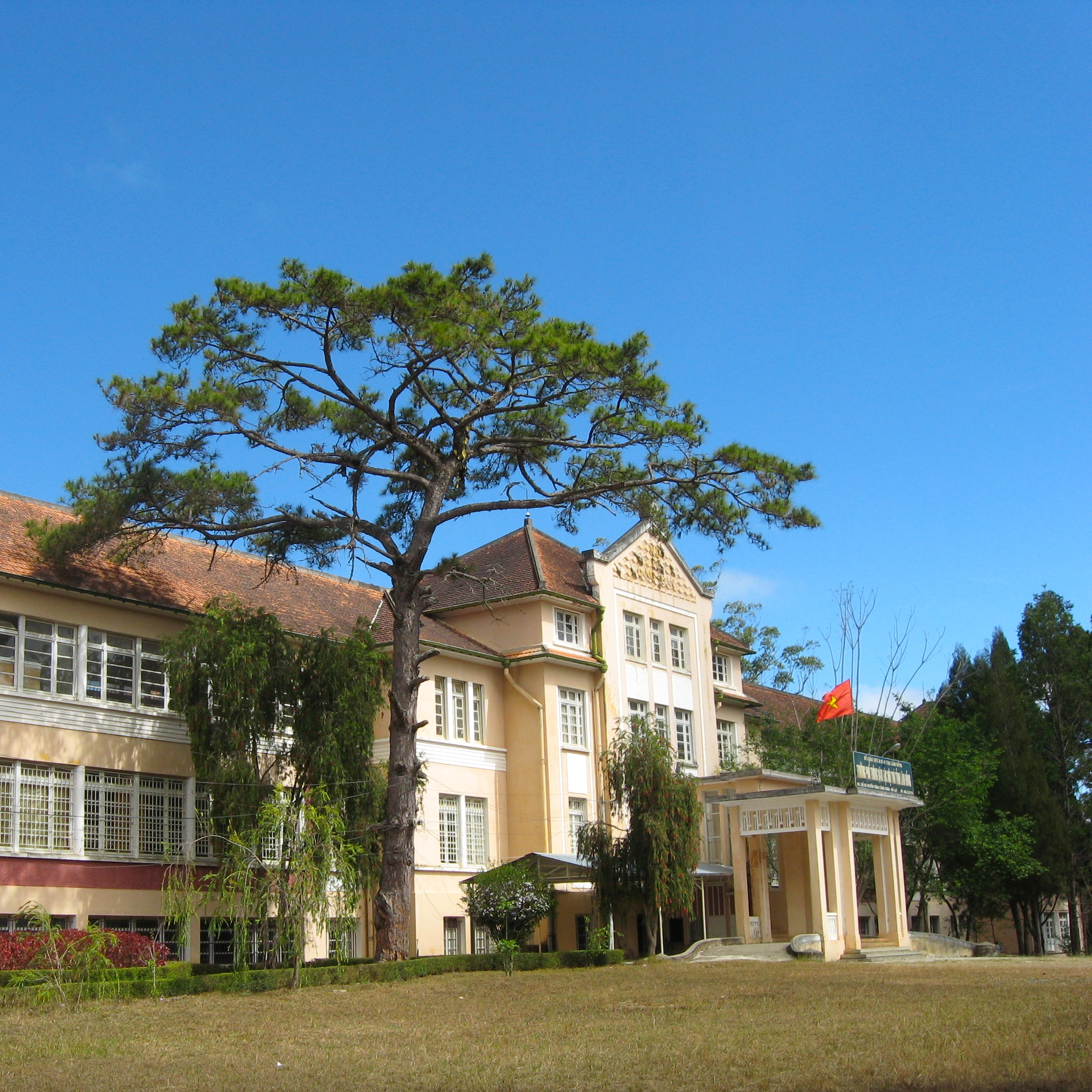 Trường Dân tộc nội trú Lâm Đồng